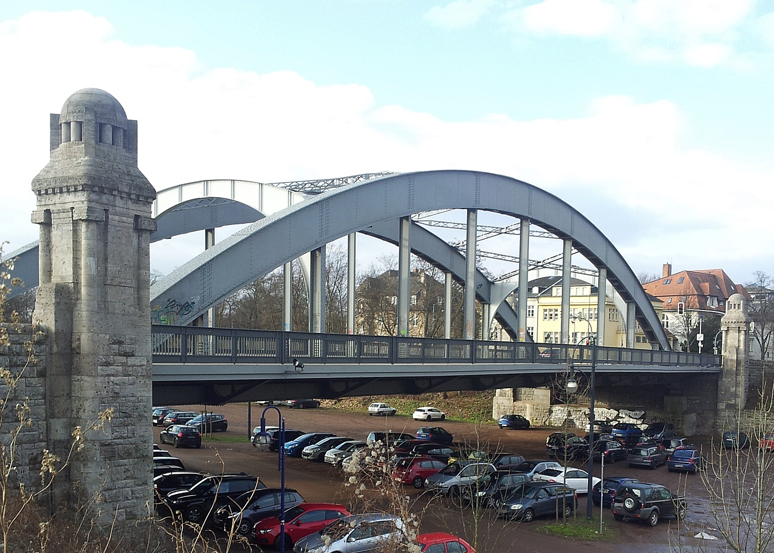 Kleine Zubringerbrücke der Sternbrücke Magdeburg